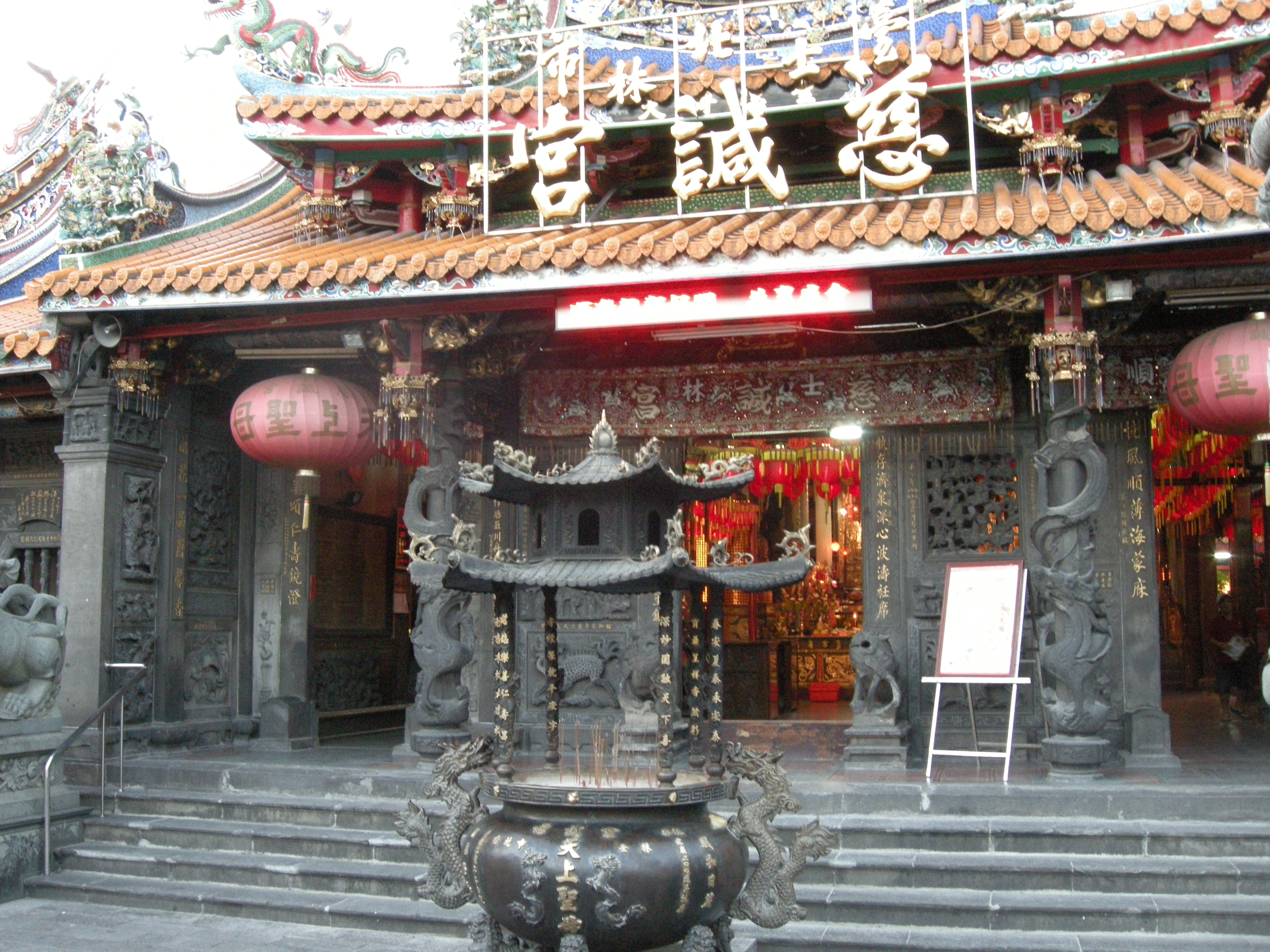 士林慈諴宮。